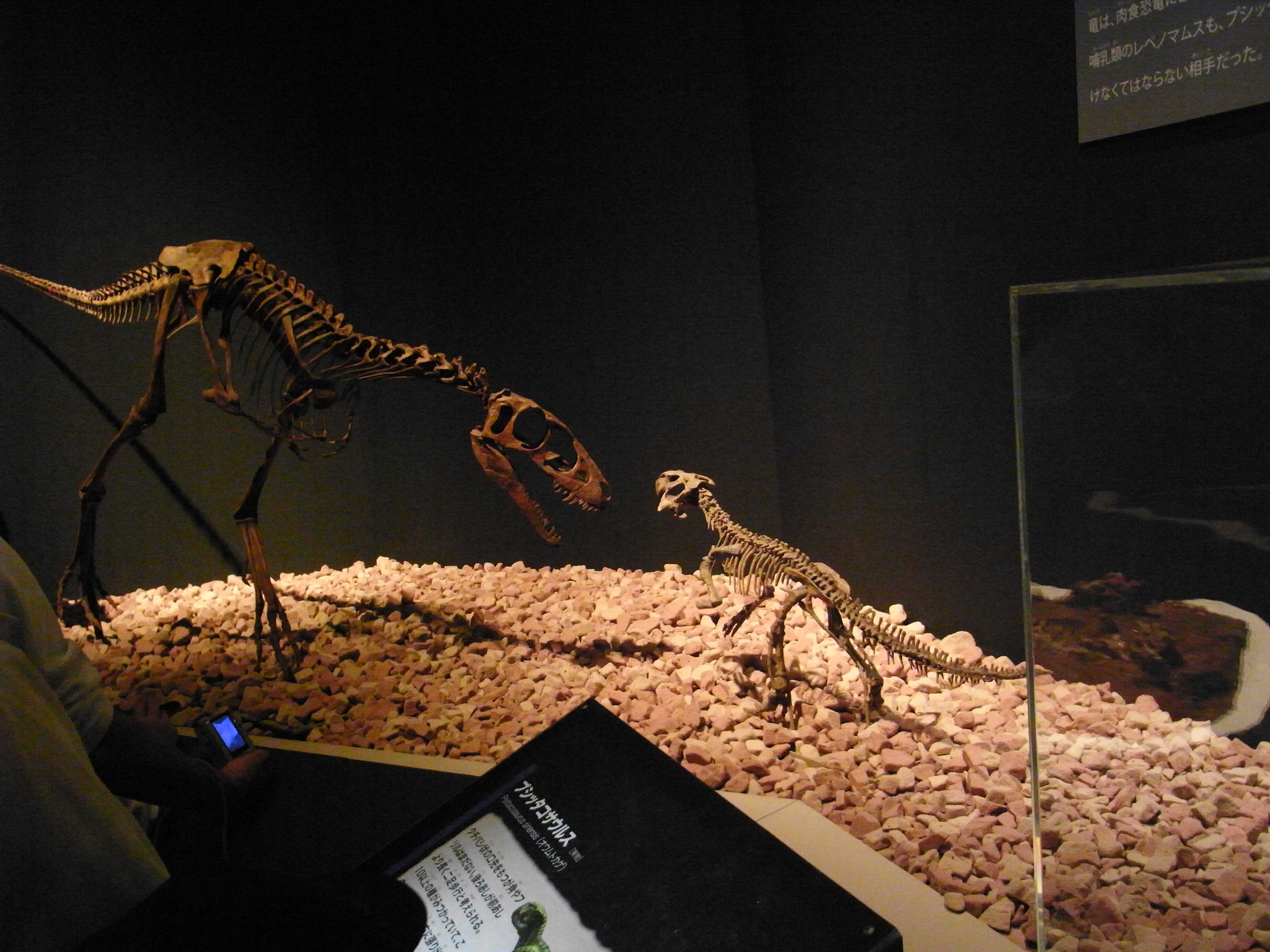 プシッタコサウルスに迫るラプトレックス・・・！